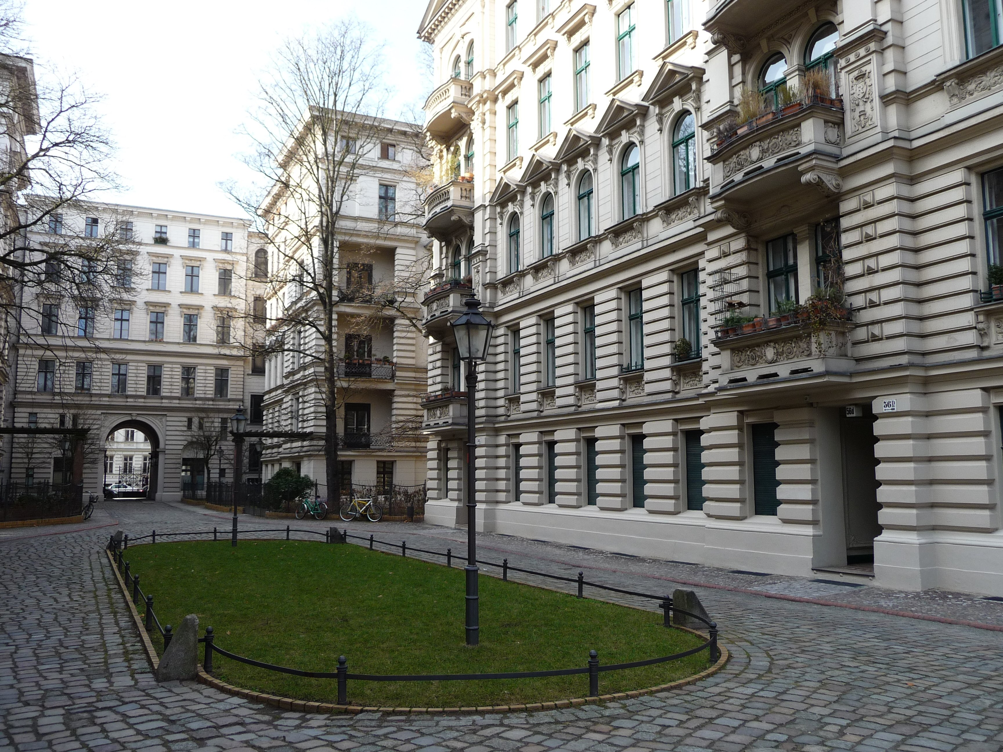 „Riehmers Hofgarten“ in Berlin-Kreuzberg, Yorckstraße; Fassadenkulisse in der deutschen Fernsehverfilmung „Ein Mann will nach oben“ von 1978